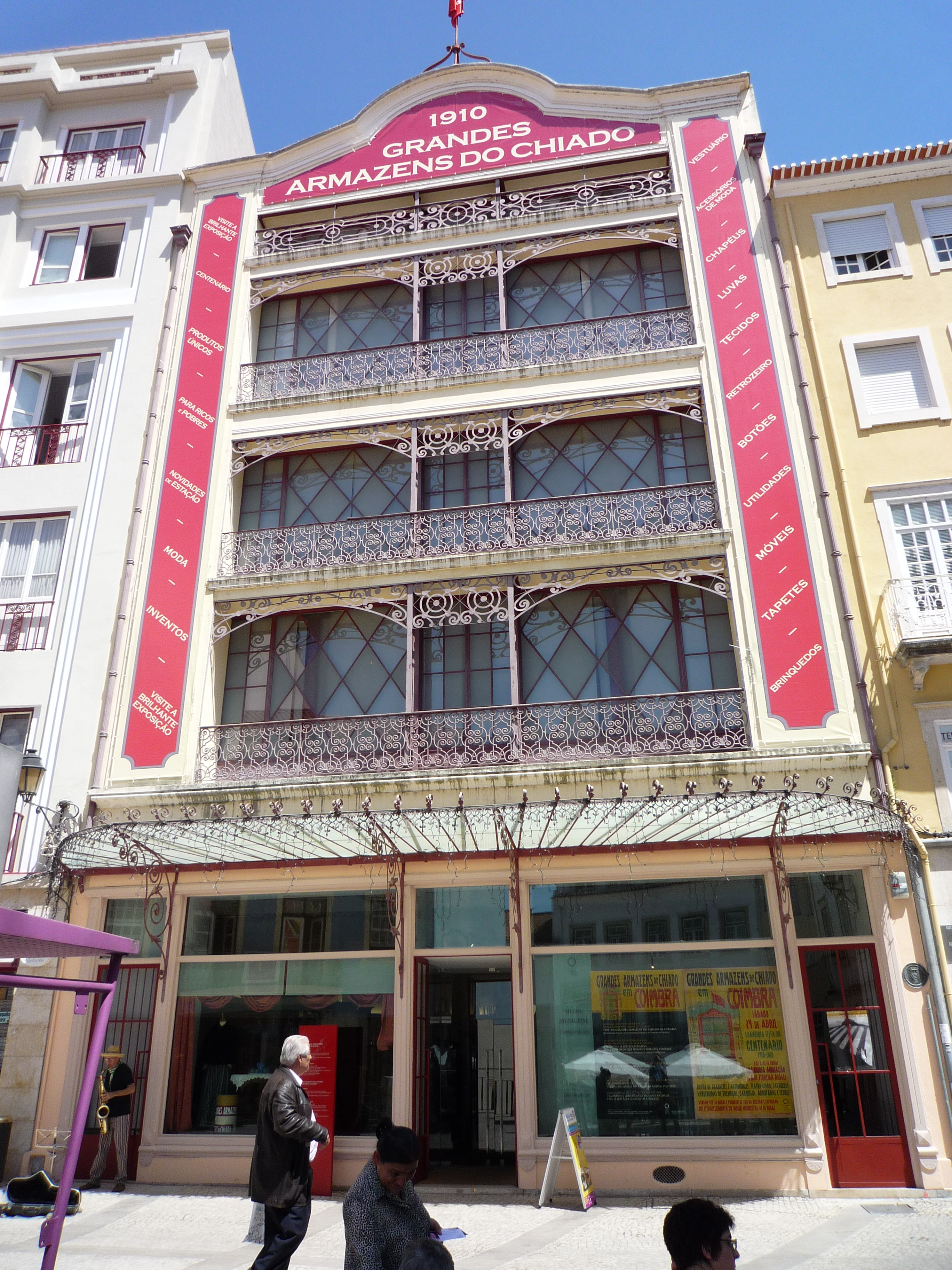 Grandes Armazéns do Chiado, Coimbra